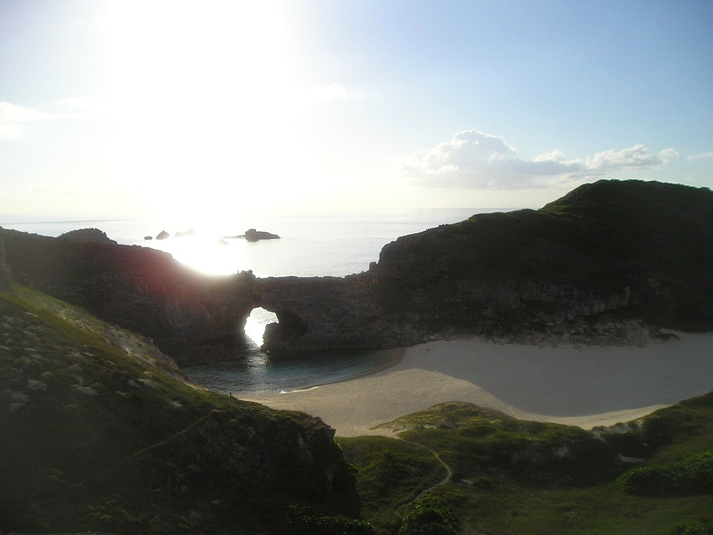 Minamijima Island, Ogasawara Village, Tokyo.